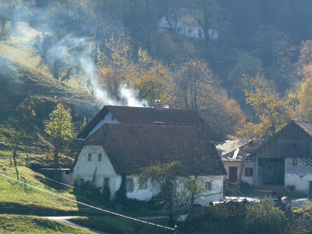 Preska nad Kostrevnico